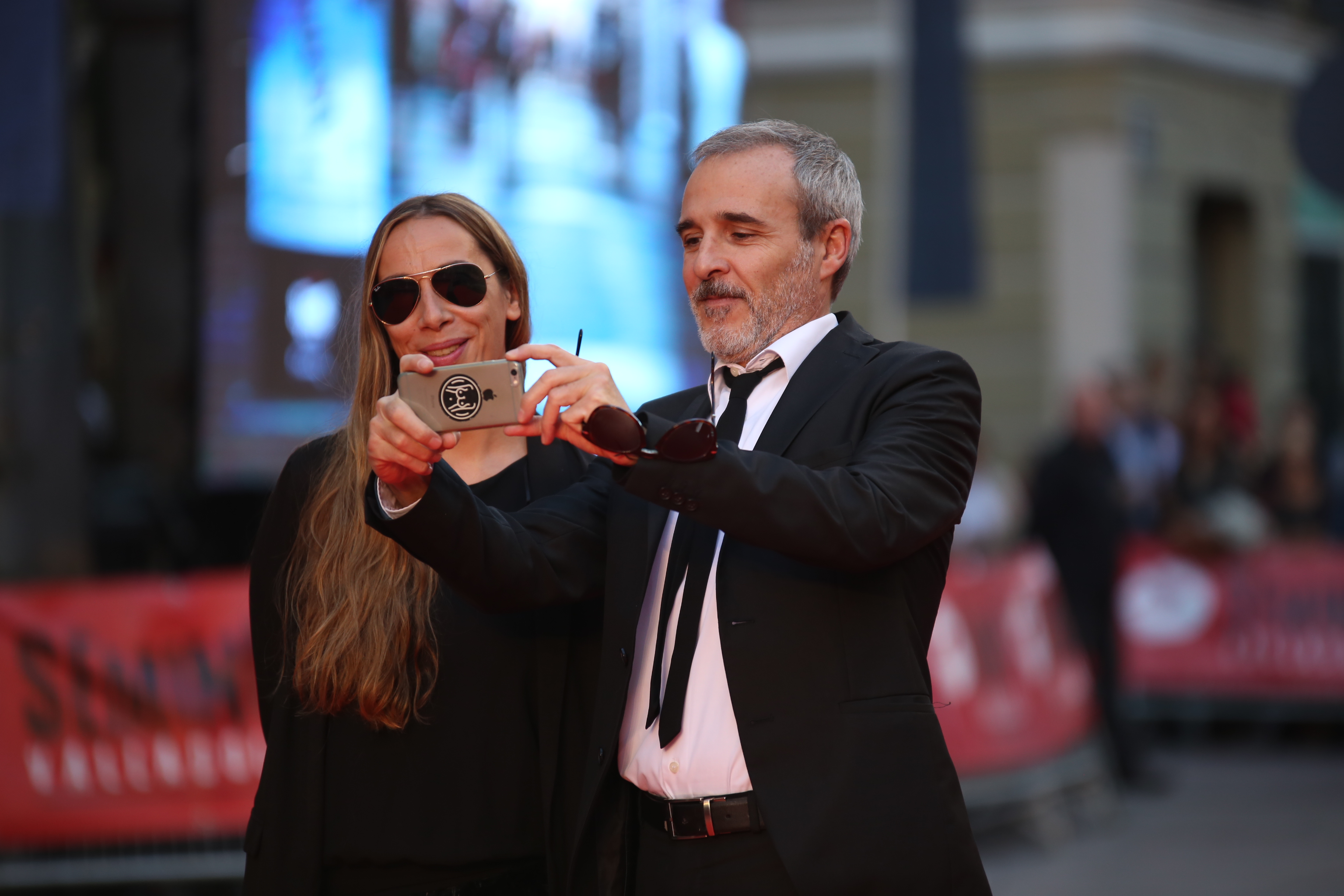 Seminci 2016